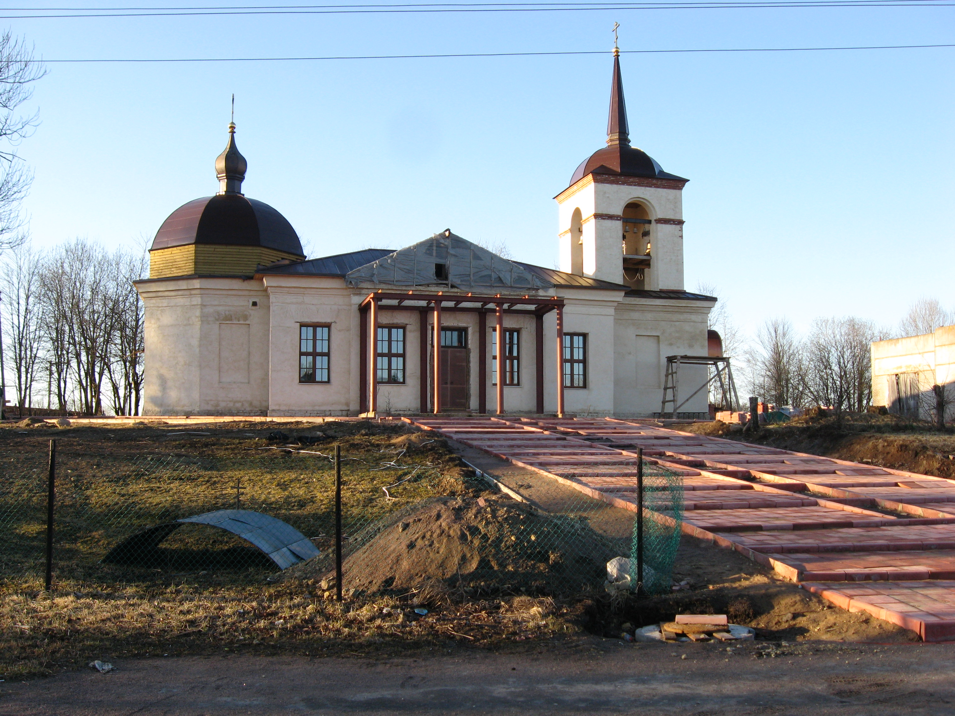 Церковь в деревне Бегуницы Ленинградской области.